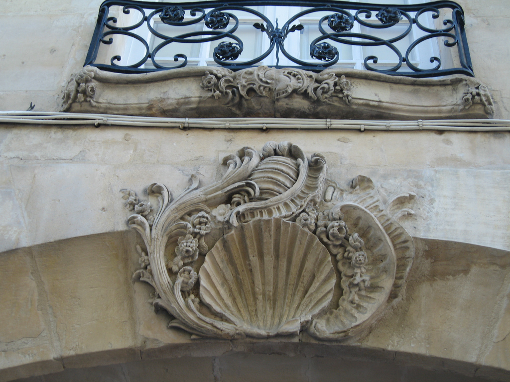 Hôtel Daumesnil à Caen (Calvados) : coquille XVIIIe